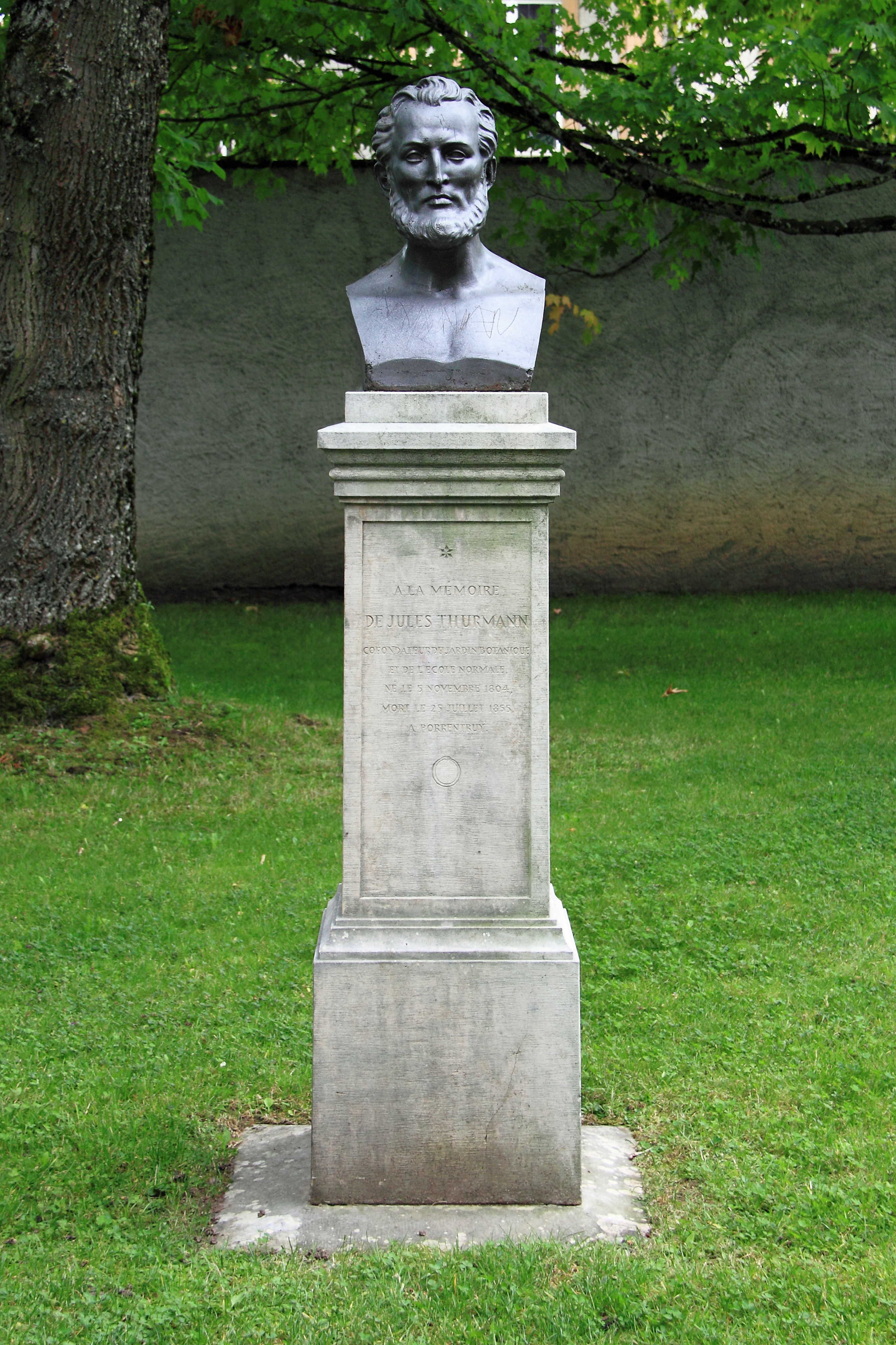 PORRENTRUY (Suisse) - Buste de Jules Thurmann au Jardin botanique.